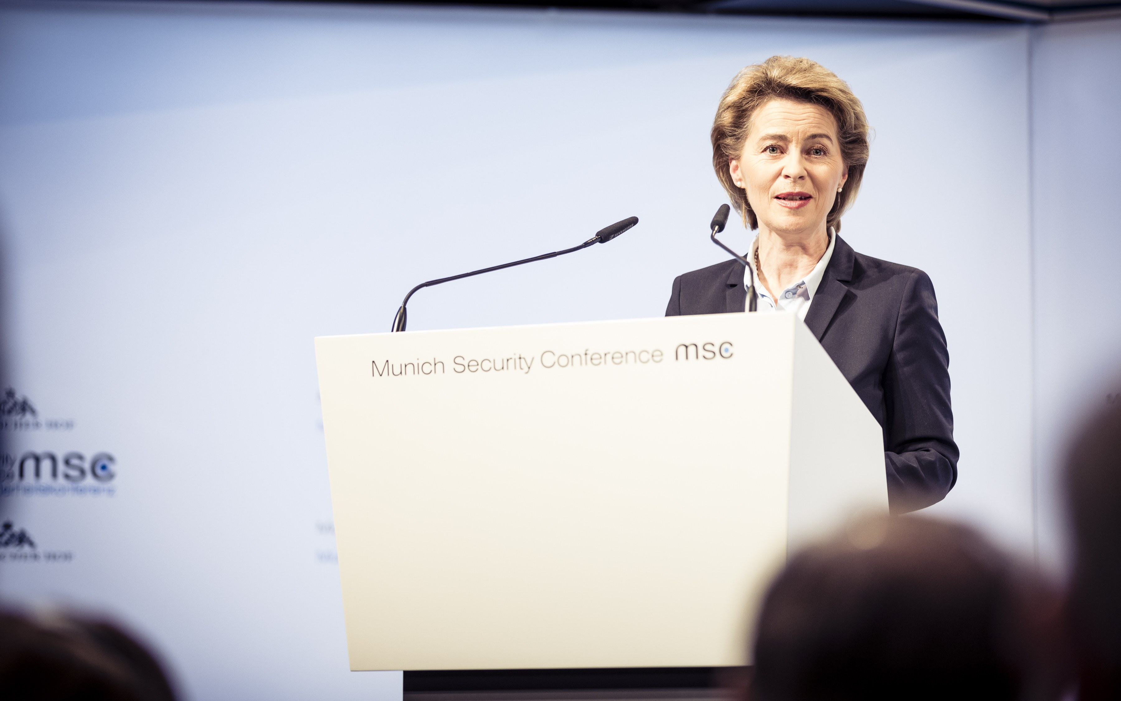 Ursula von der Leyen während der Münchener Sicherheitskonferenz 2018